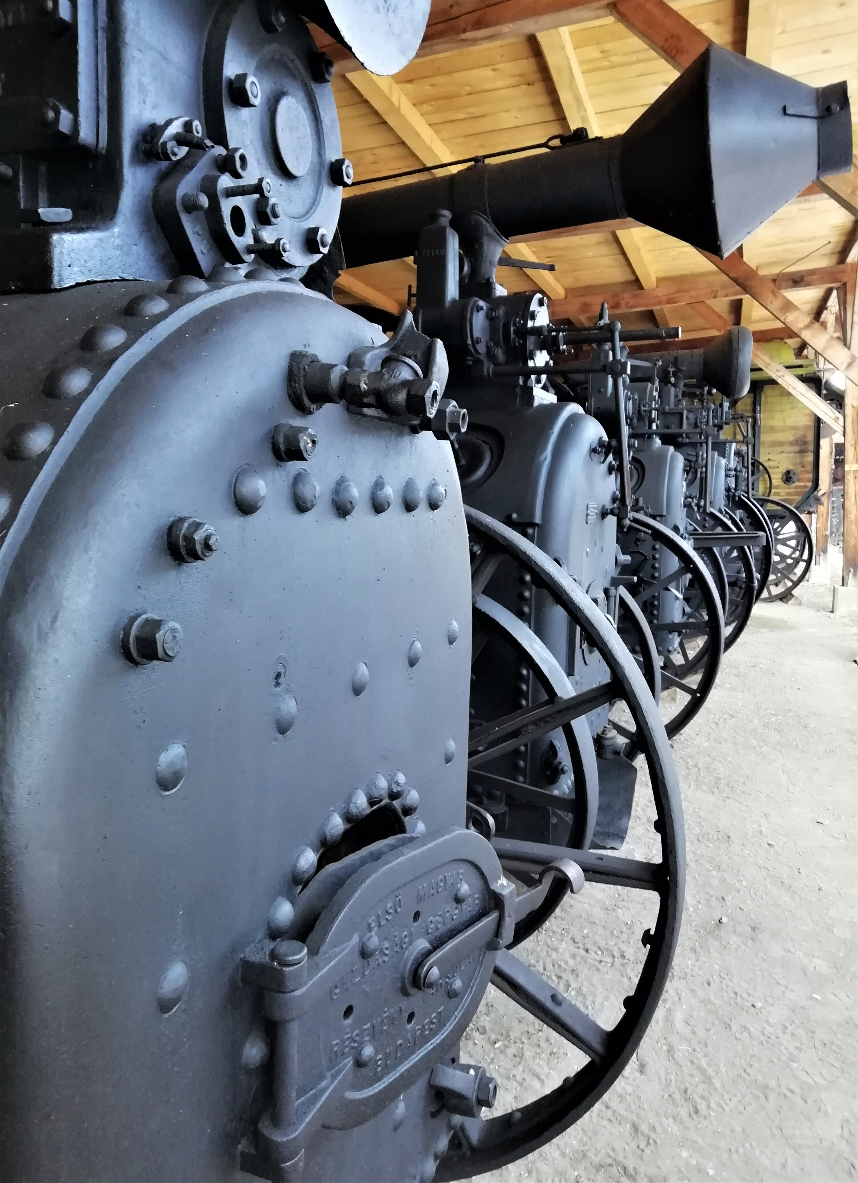 A múzeum Erdély-szerte egyedülálló mezőgazdasági szerszám- és gépgyűjteménnyel rendelkezik.